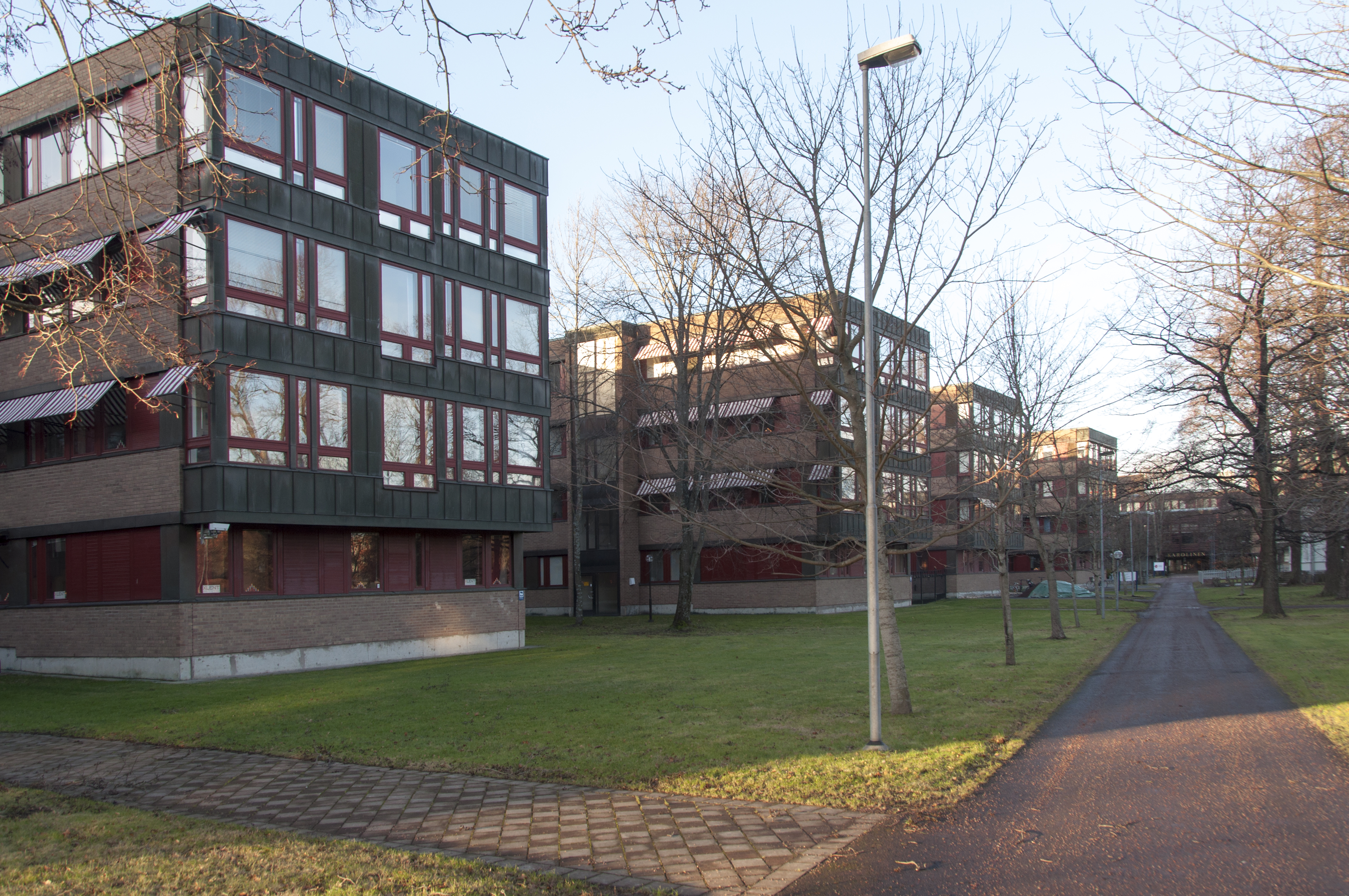 Karolinen, Karlstad. Arkitekt Gösta Edberg Byggnadsår:1973-1978